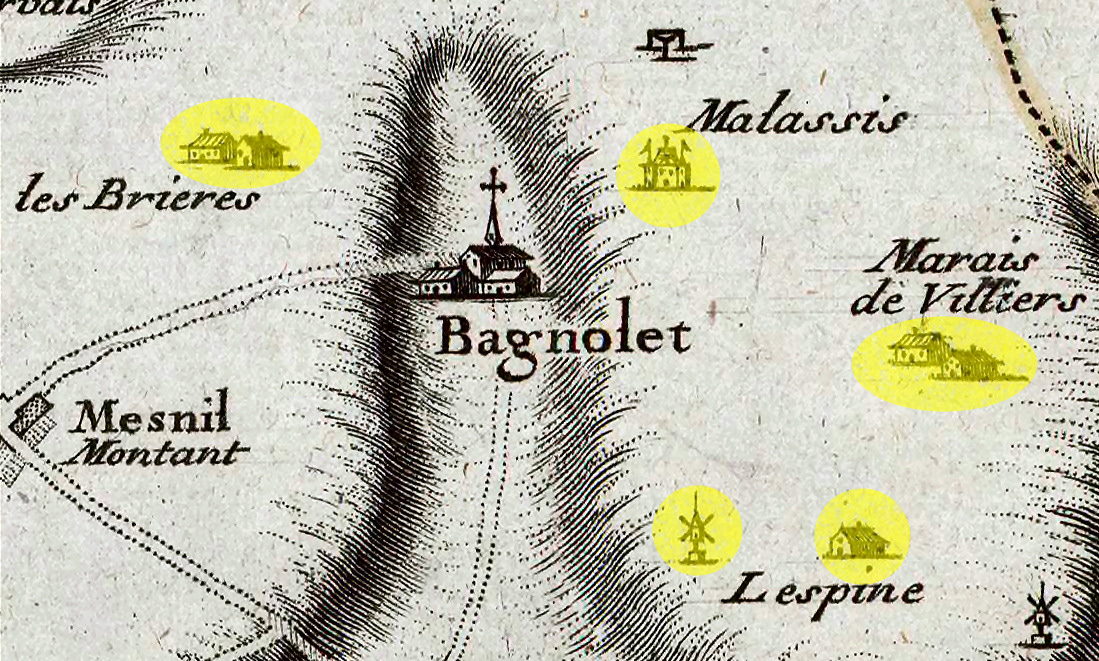 Bagnolet : résidences et propriétés évoquées au XVe siècle.